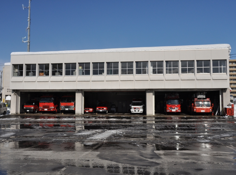 置賜広域行政事務組合消防本部・米沢消防署